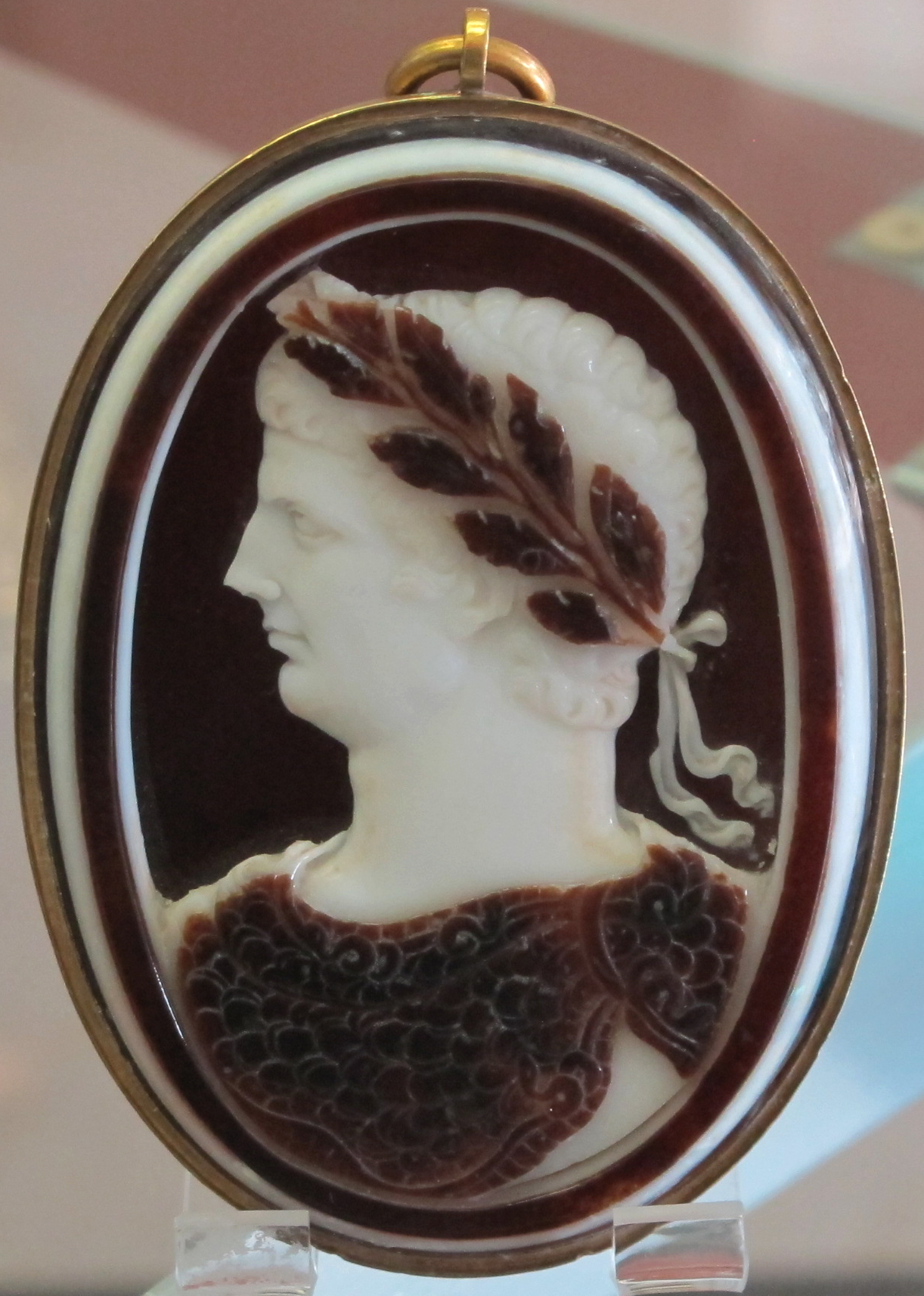 Arte romana, claudio, sardonice, 41-42 dc.